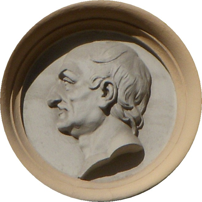 Medaljong av Polhem på Gamla Jernkontorets hus på Norrmalm i Stockholm